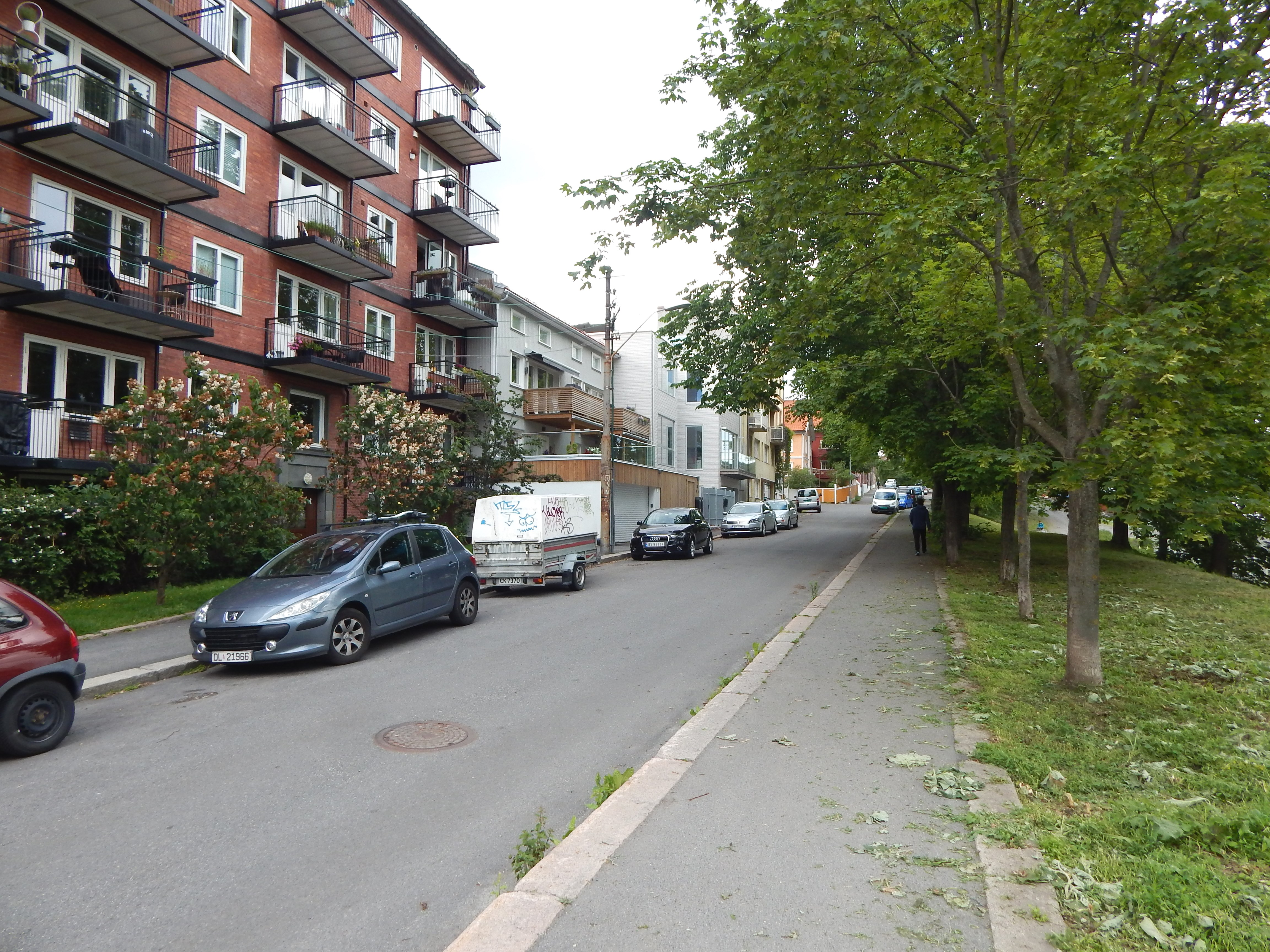 Hølandsgata